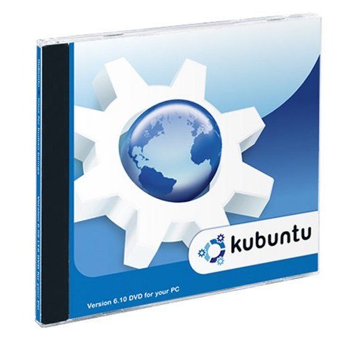 DVD de Kubuntu